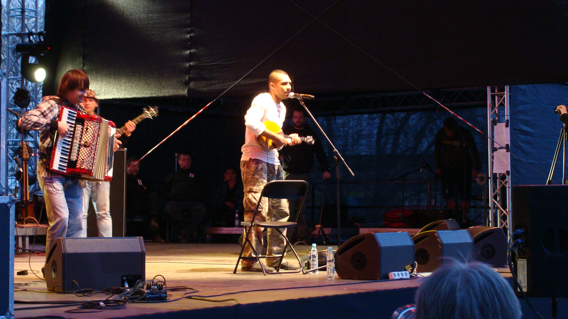 Andrej Takindang wraz z zespołem "Recha" na koncercie "Solidarni z Białorusią" na placu Defilad w Warszawie.